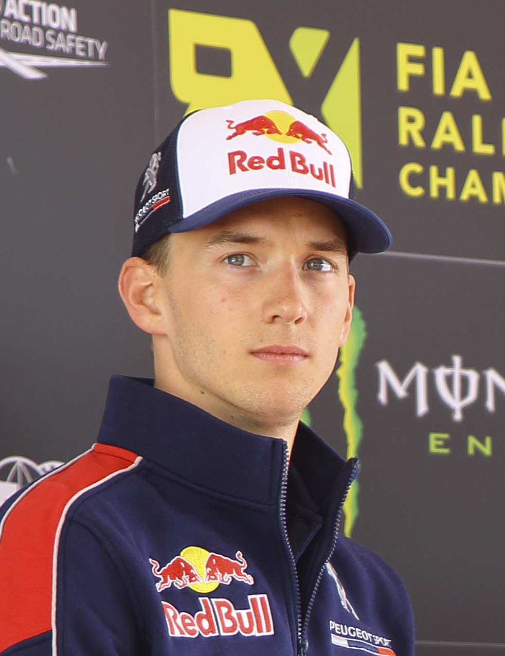 Johan Kristofferssonganó en la final en Portugal, tras hacerlo en España, el Sueco se afianza en el liderato provisional del Campeonato. Sin embargo no fue el mejor en las mangas de entrenamiento que fueron dominadas por Andreas Bakkerud.